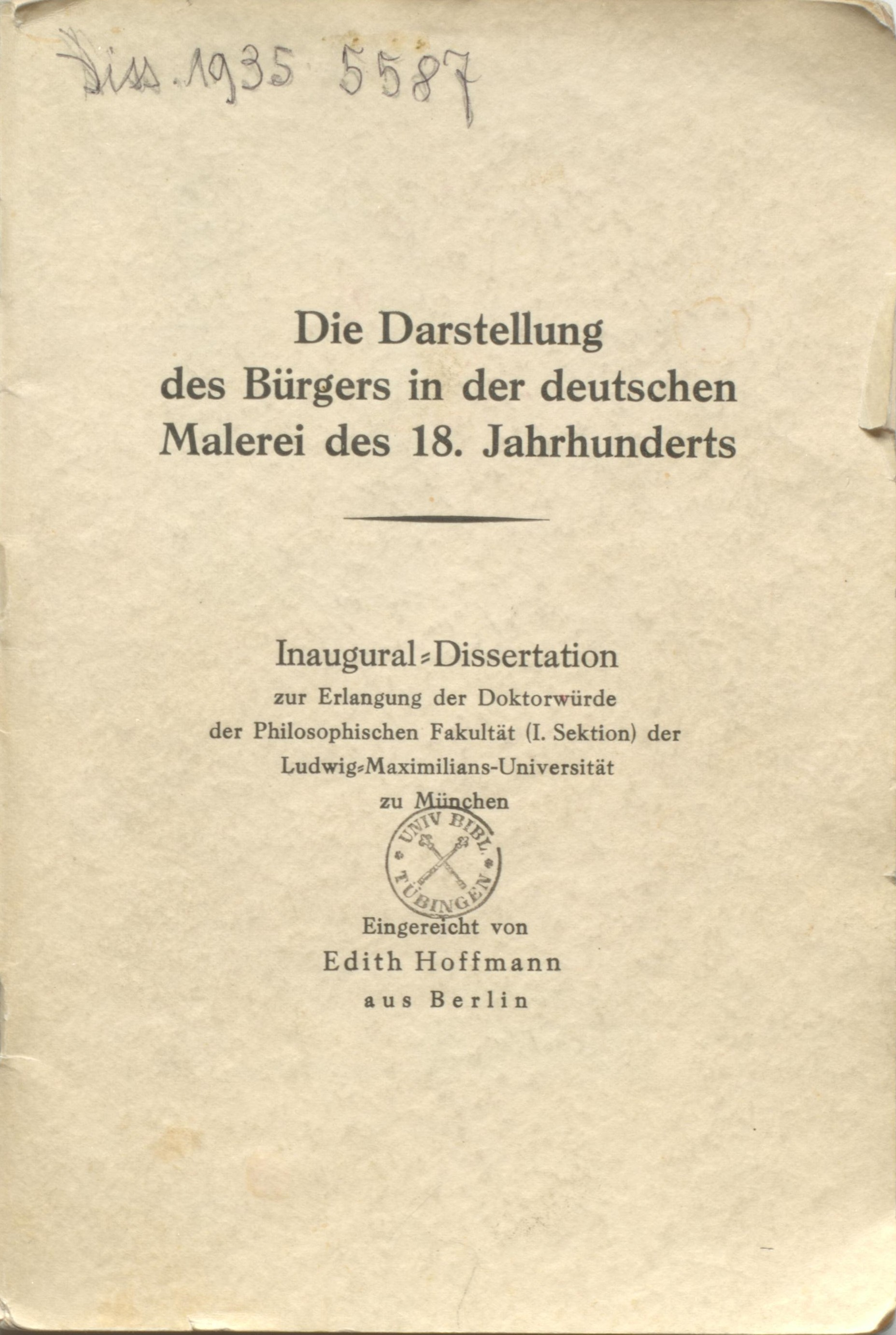 Edith Hoffmann Die Darstellung des Bürgers in der deutschen Malerei des 18. Jahrhunderts. Dissertation. Universität München, 1934